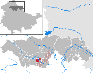 Wasserthaleben in Thuringia - Kyffhäuserkreis